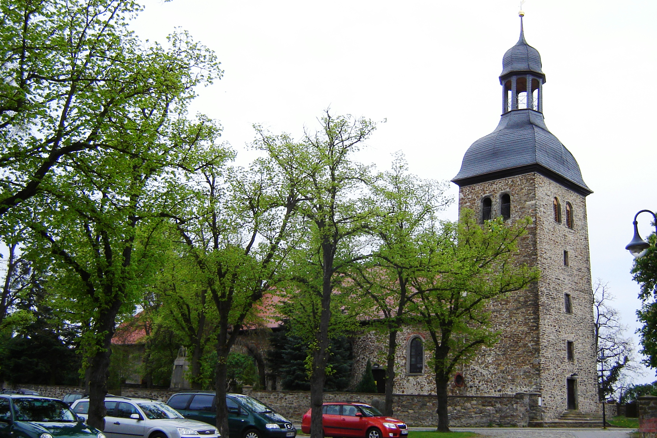 Kirche in Flechtingen, Sachsen-Anhalt, Deutschland